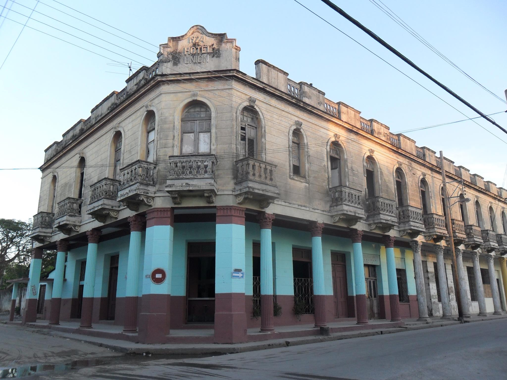 Florida, Cuba